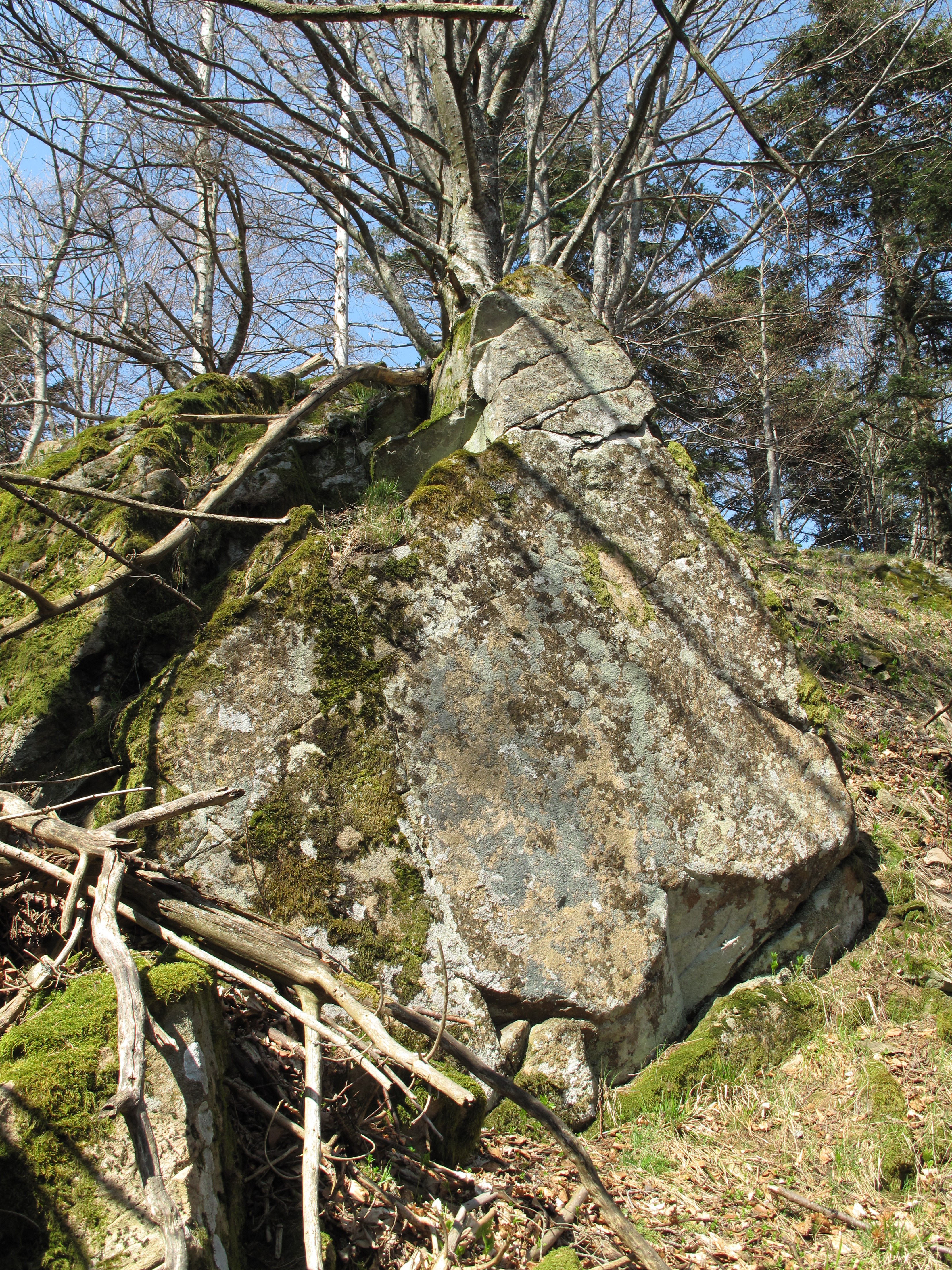 Eckpfeilerartige Felsglättung. An seinem nur wenige Meter weiter östlich gelegenen Gegenstück finden sich Reste einer Futtermauer aus Kleinquader in noch erkennbar regelhafter Schichtung.